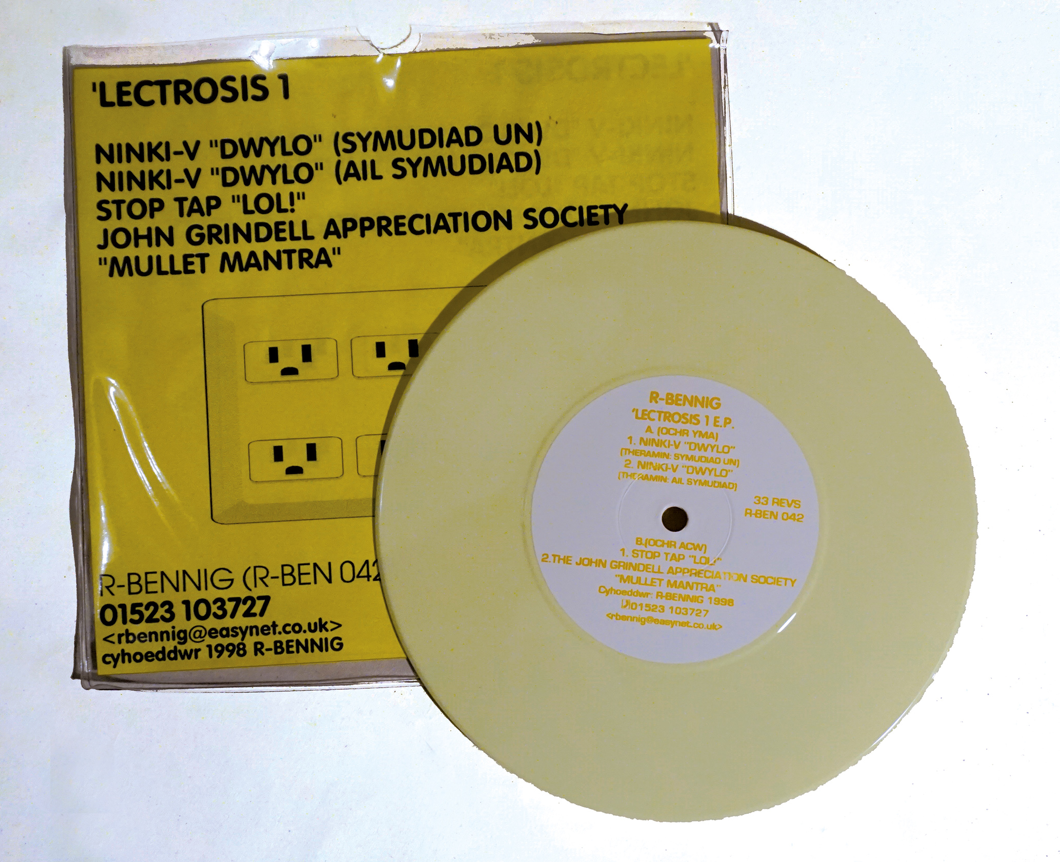 Ffotograff o record Lectoris EP,, Label R-Bennig (R-BeEN 042) 1998